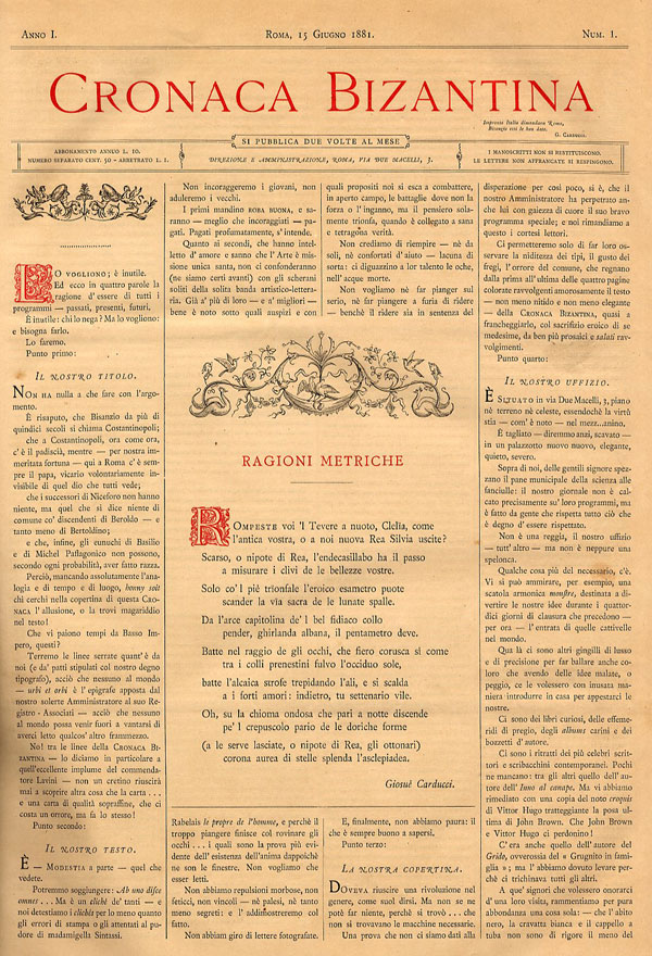 Giosuè Carducci, Ragioni metriche, «Cronaca Bizantina, I, 15 giugno 1881, n. 1